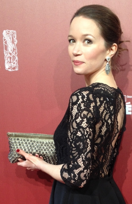 Chloé Stefani à la 41e Cérémonie des César